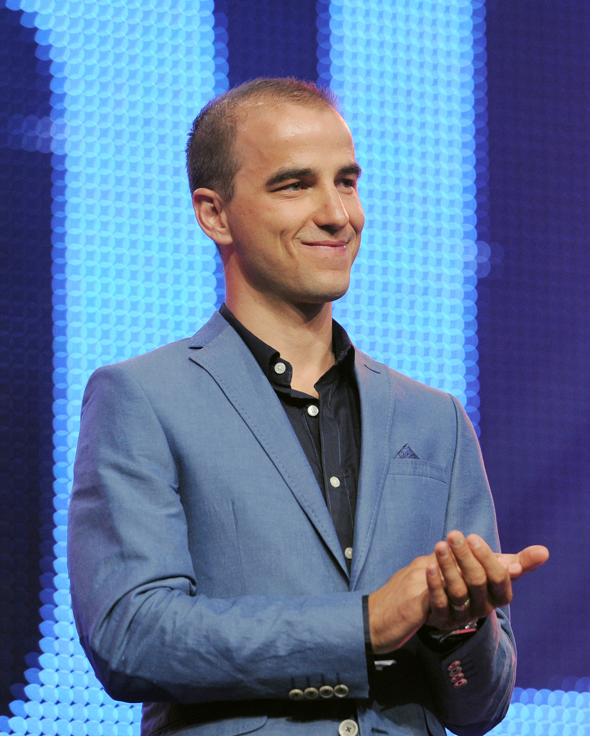 Davos, 03.10.2014. Sport, 12. Internationale Sportnacht Davos 2014. Der Mountainbiker Nino Schurter. . Copyright by: foto-net / Kurt Schorrer